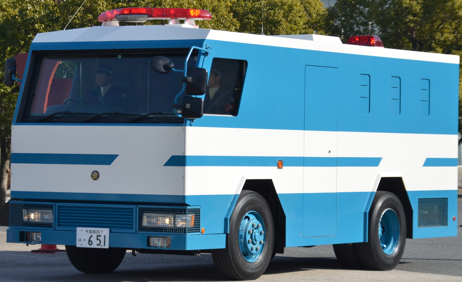 小型警備車。千葉県警年頭視閲式にて撮影。